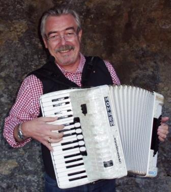 Der oberfränkische Mundartkünstler bei einem seiner Auftritte im Dom der "Teufelshöhle" bei Pottenstein